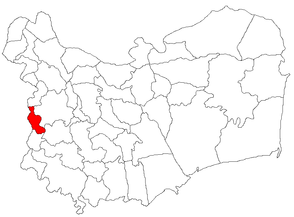 Categorie:Hărţi ale judeţului Tulcea